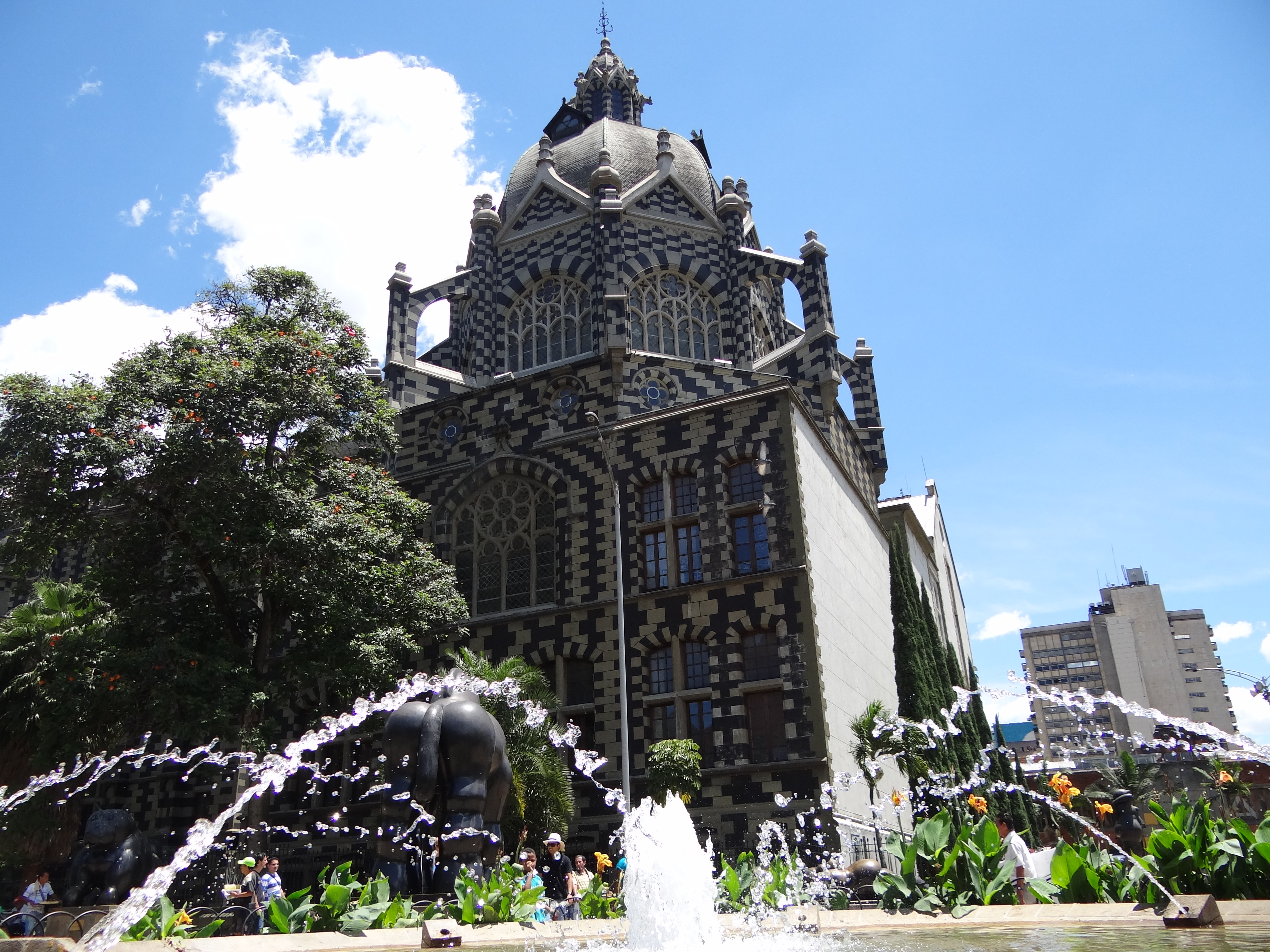 Palacio de la Cultura Rafael Uribe Uribe